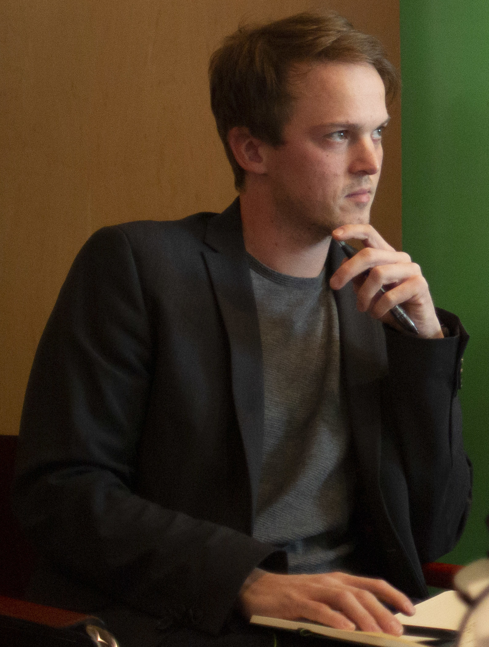 F70A8497